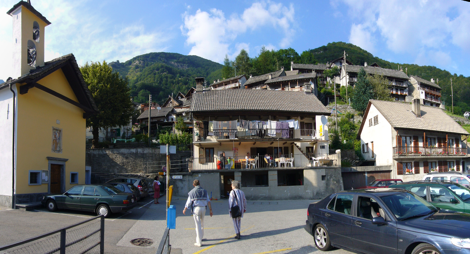 Centro